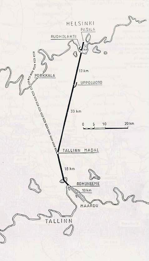 Helsinki-Tallinna ratahanke